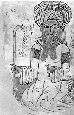 Avicenna. From medieval manuscript entitled ‘Subtilties of Truth’, 1271